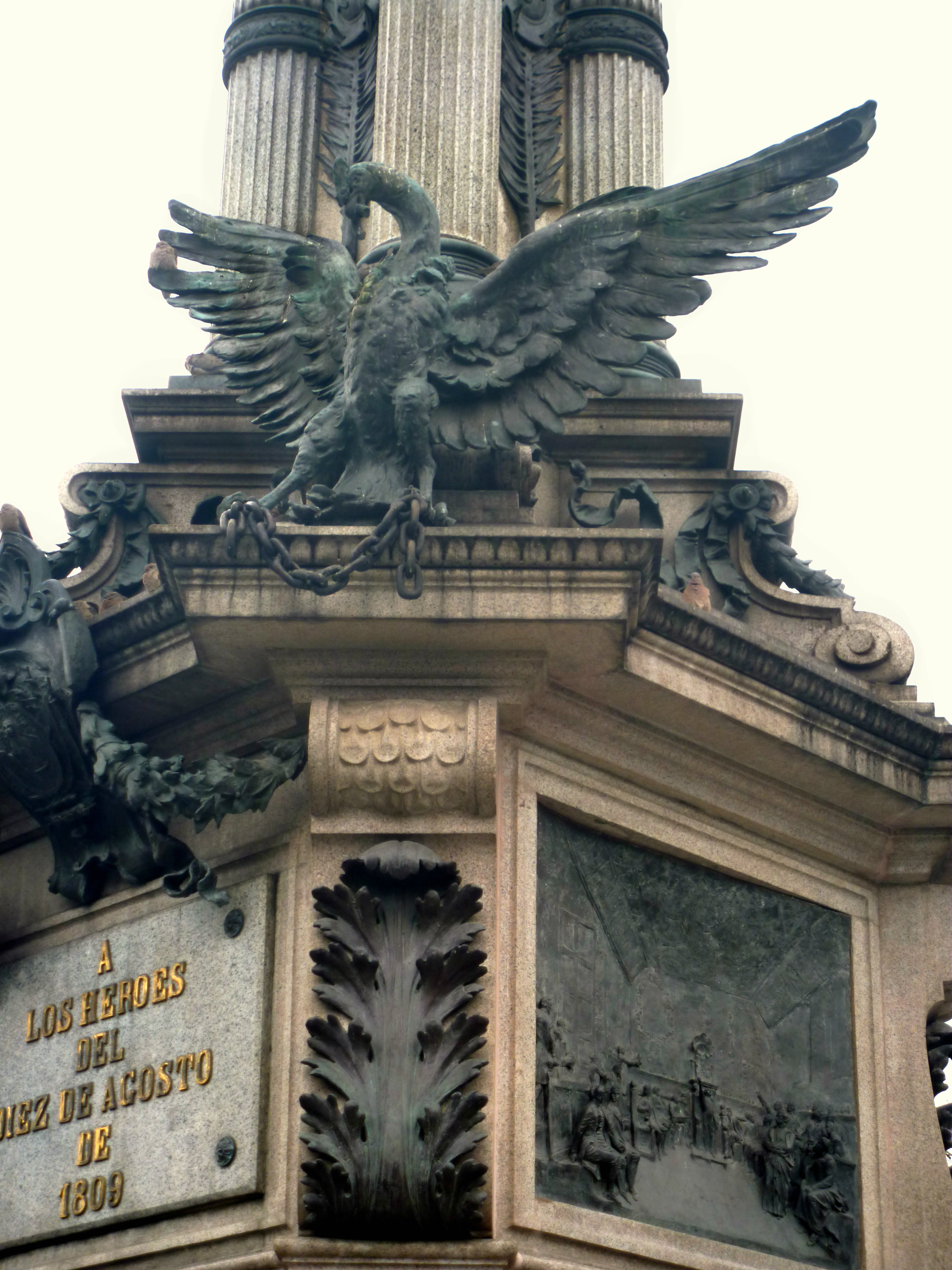 Detalle del Monumento a la Independencia, levantado en la Plaza Grande de Quito DM (Ecuador). El cóndor, ave emblemática de Los Andes y símbolo que corona el escudo de armas del país, es una alegoría de la libertad, pues está rompiendo una cadena con su pico.